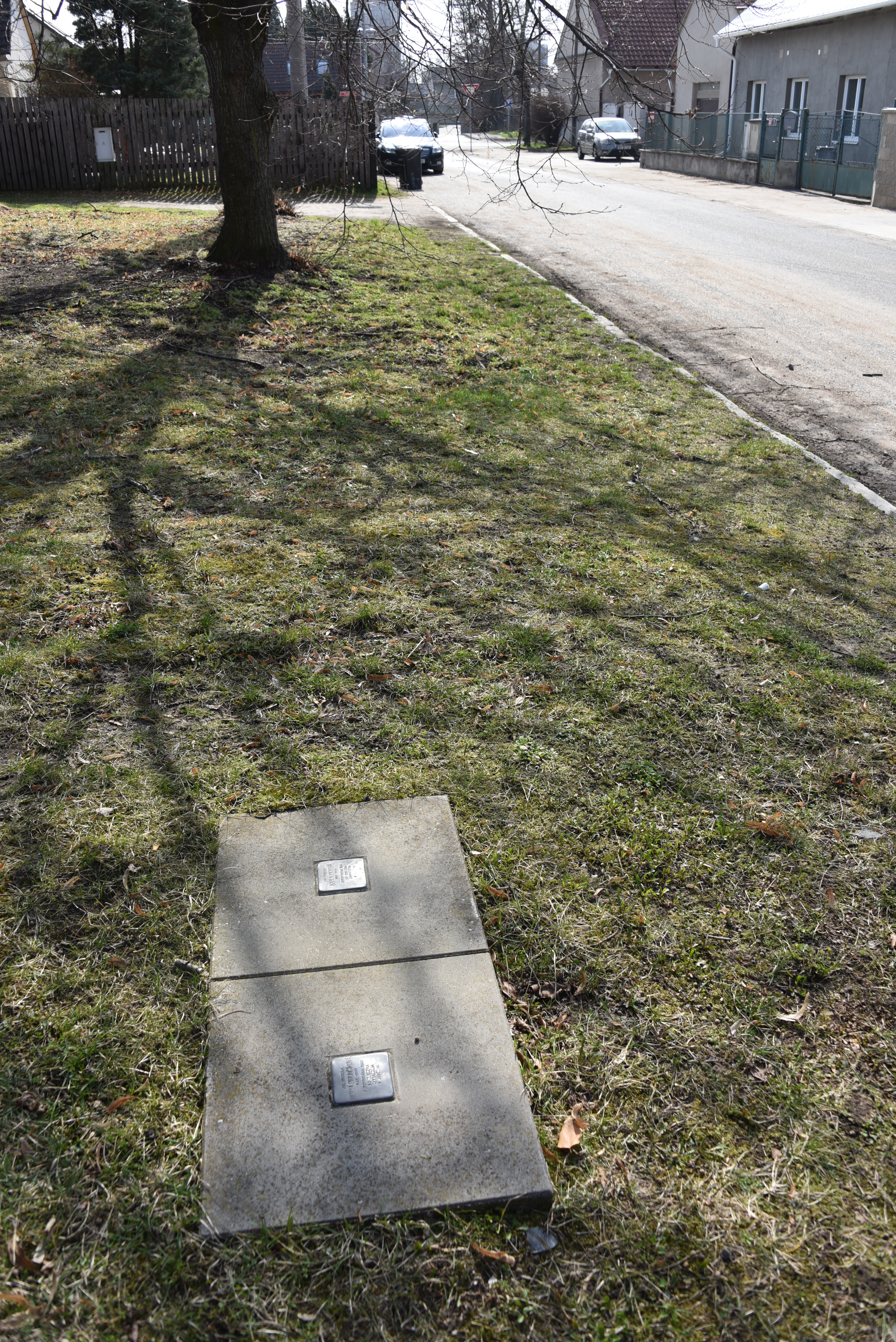 Stolpersteine in Neratovice, Corner of Berty Pirunčíkové and U Luk